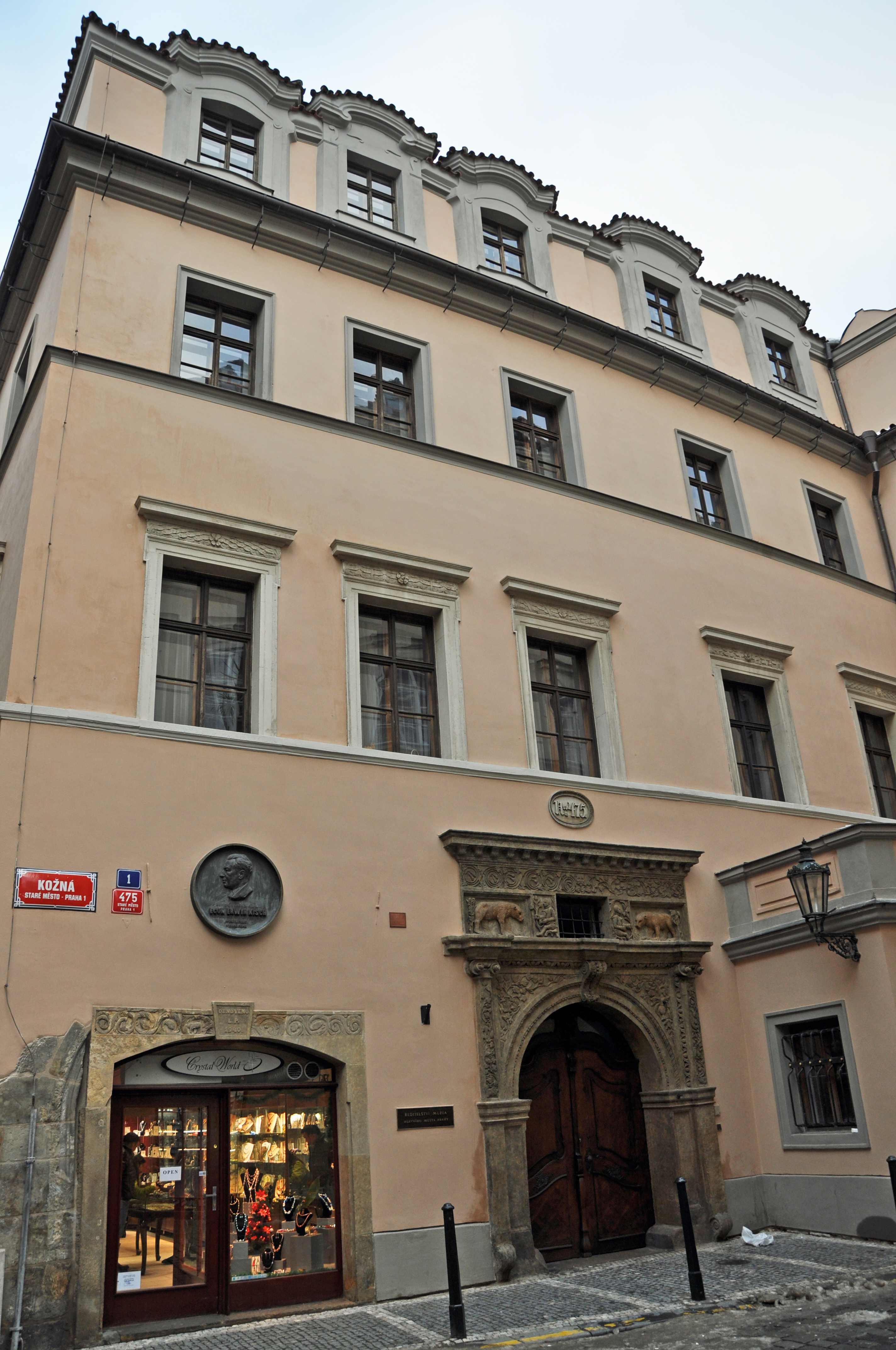 Praha 1-Staré Město, Kožná 475/1, U dvou zlatých medvědů.